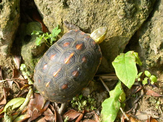 セマルハコガメ、西表島にてw:ja:User:Anonymous Powered撮影